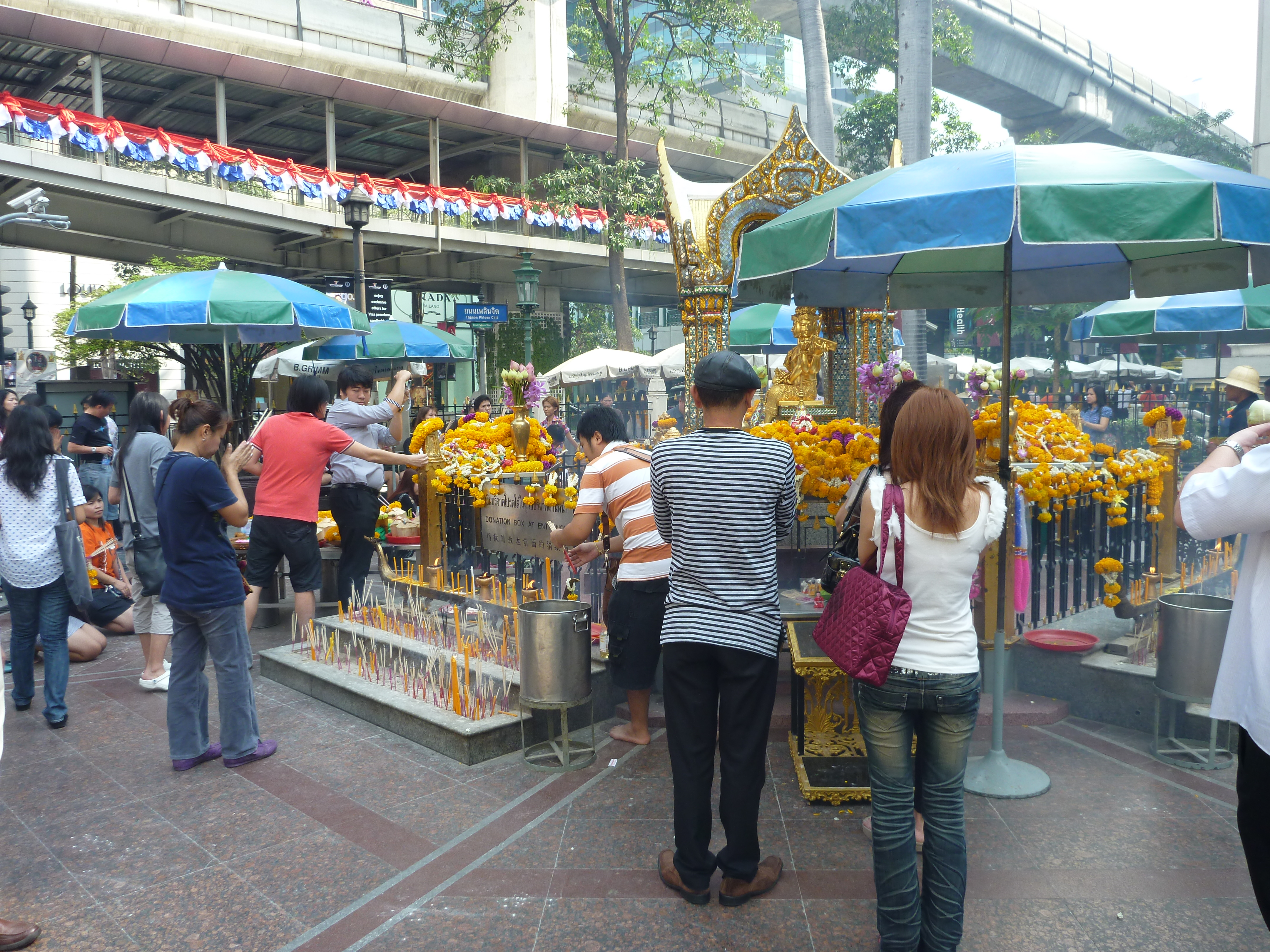 Erawan Shrine